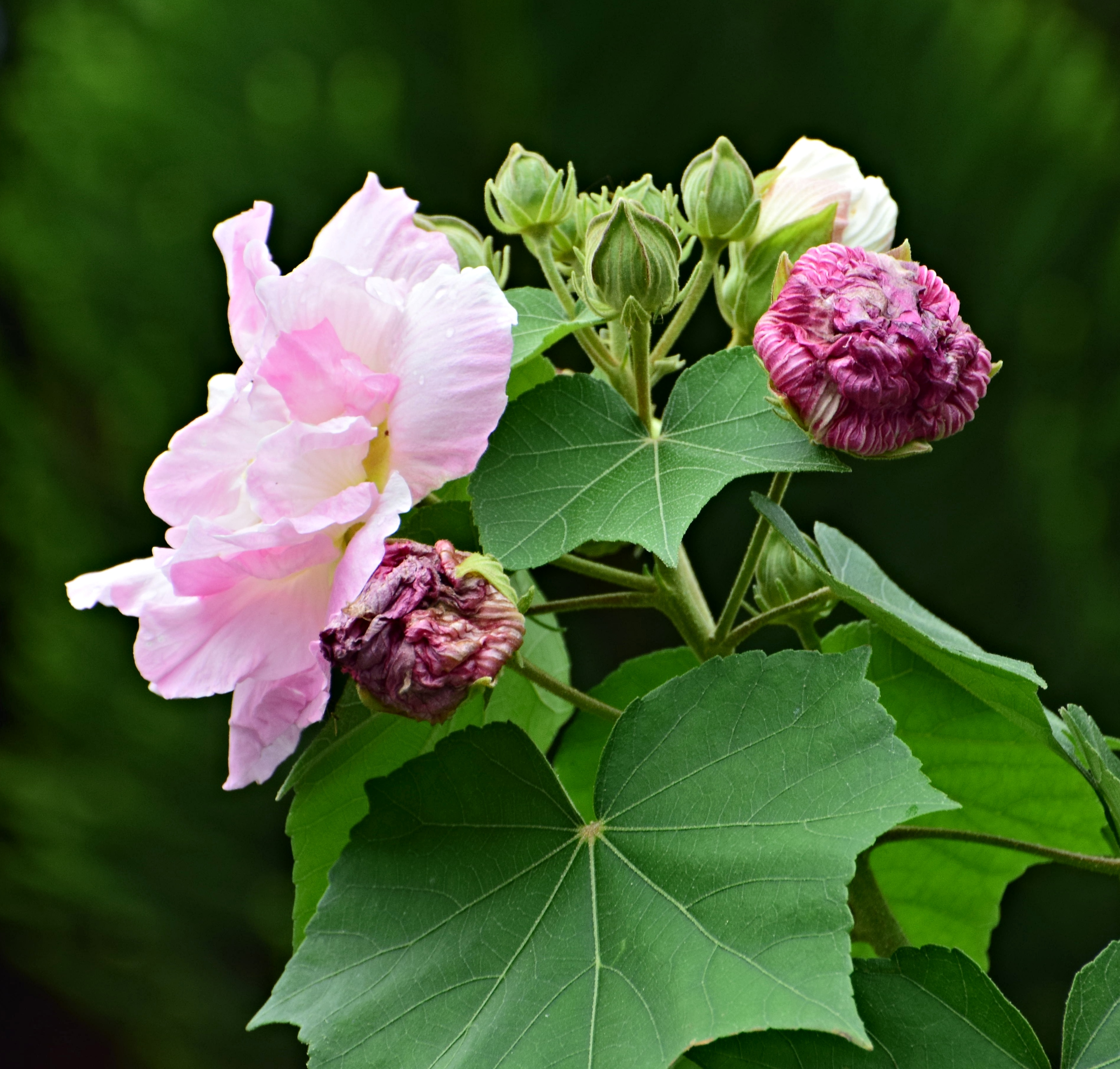 Rosa de engaño - Amistad del día (Hibiscus mutabilis)